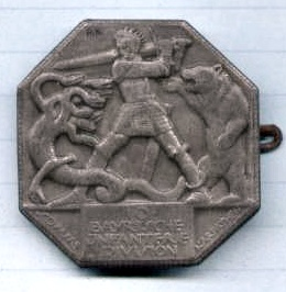 10. Bayerische Infanterie-Division, Erinnerungs-Abzeichen (Kappenabzeichen), 1917